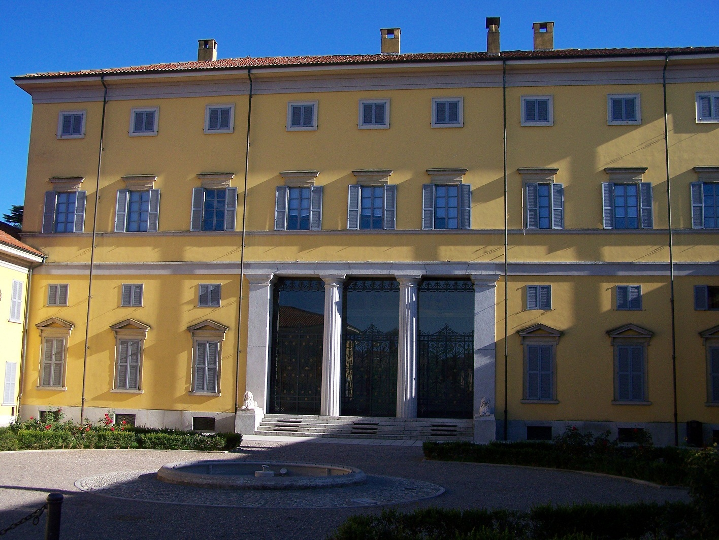 Villa Annoni a Cuggiono (MI) - Italy